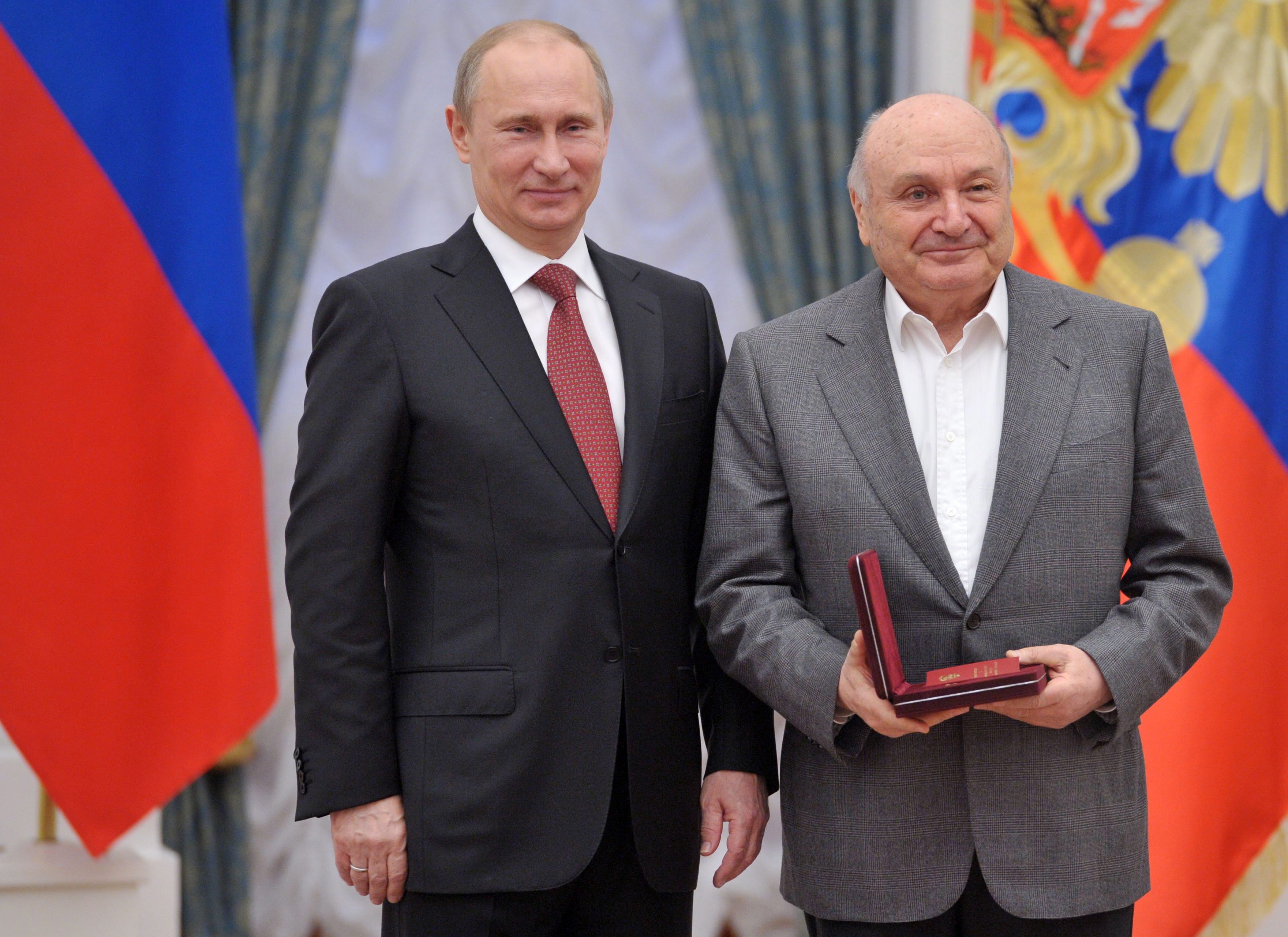 Церемония вручения государственных наград РФ. Почётное звание «Народный артист Российской Федерации» присвоено художественному руководителю Московского театра миниатюр Михаилу Жванецкому